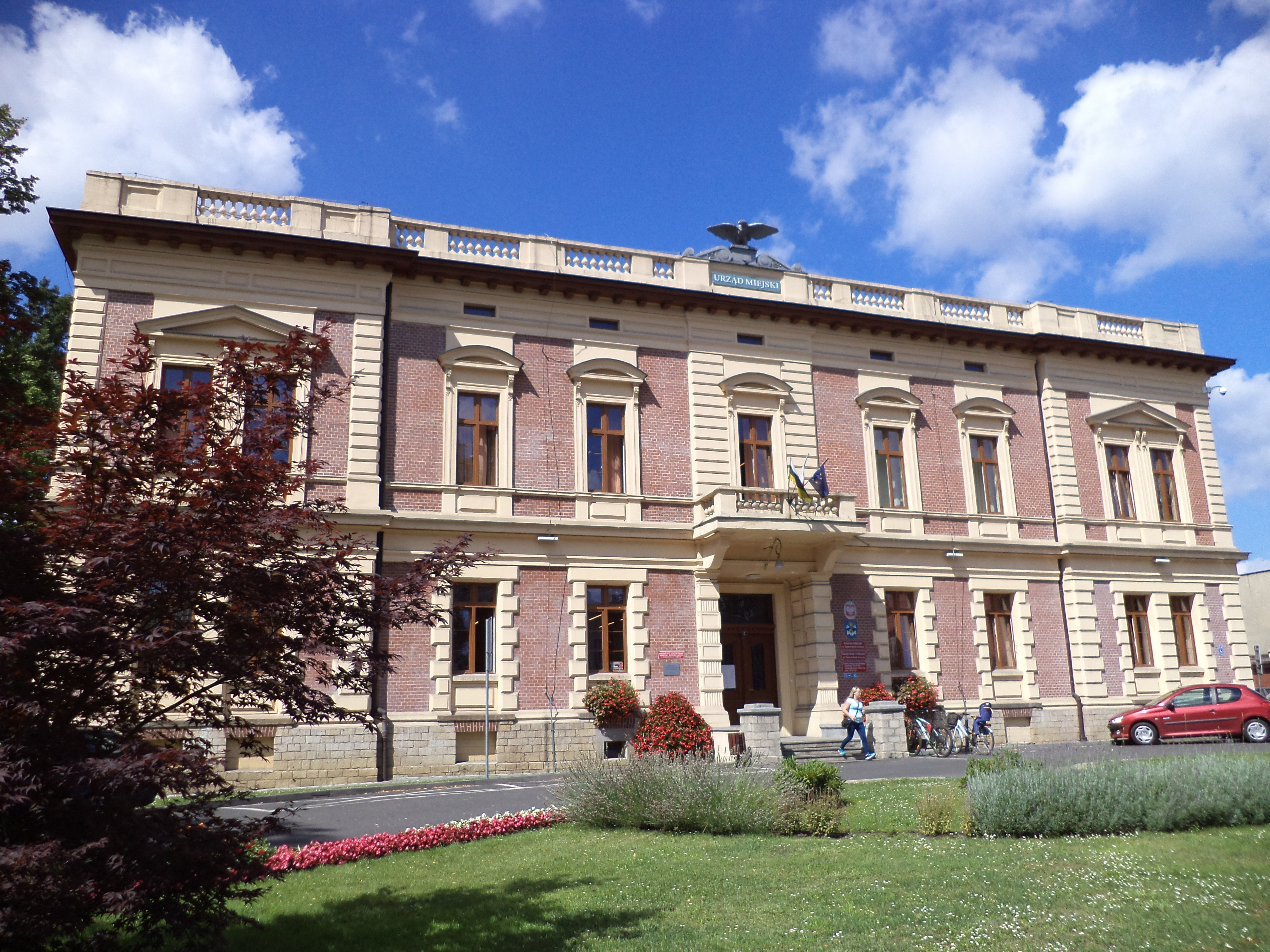 Budynek Urzędu Miasta Tarnowskie Góry przy ul. Sienkiewicza 2 (dawna landratura)